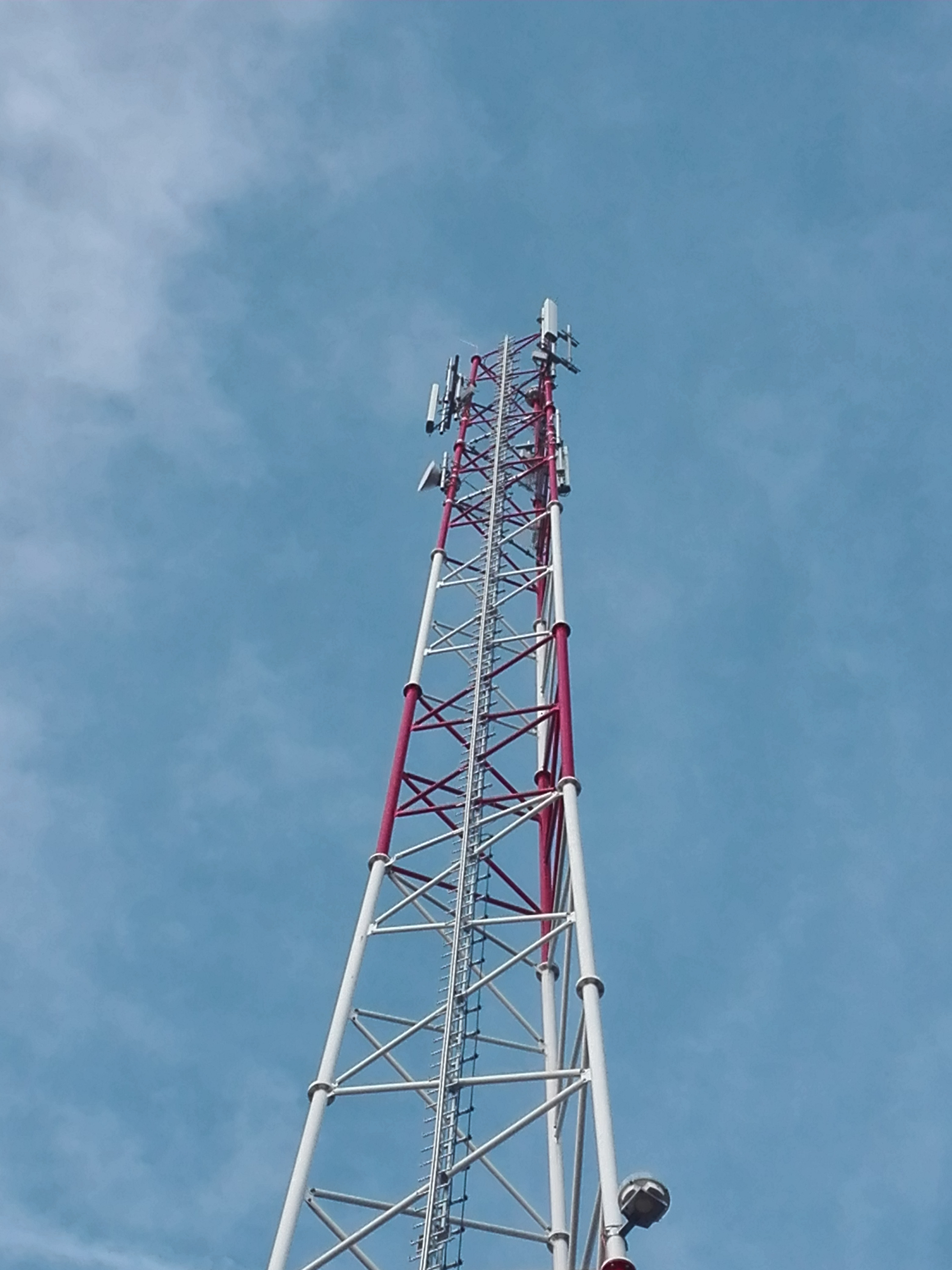 maszt Play w Tarcach k Jarocina